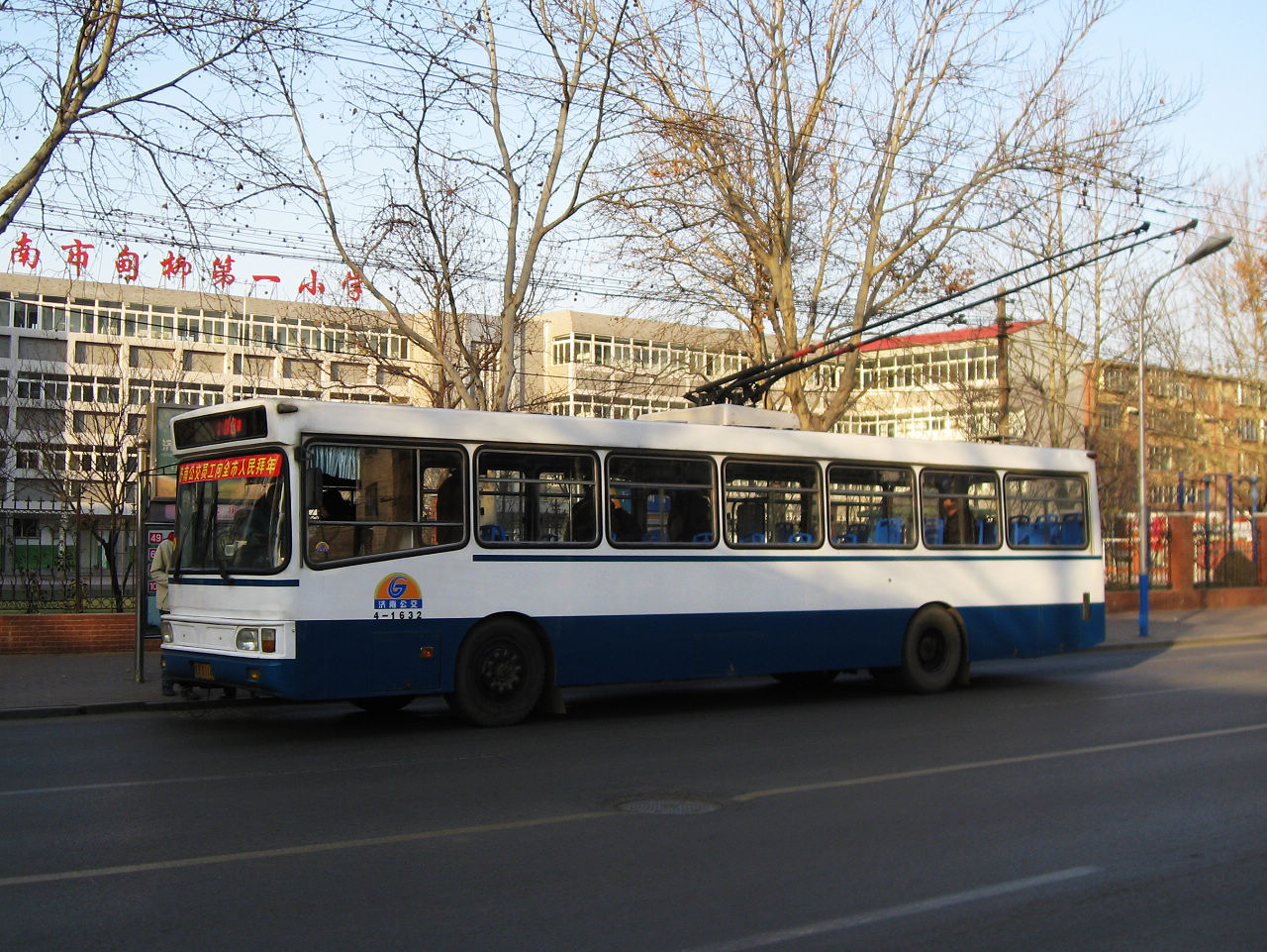 济南无轨电车所使用的车型：JK6120D